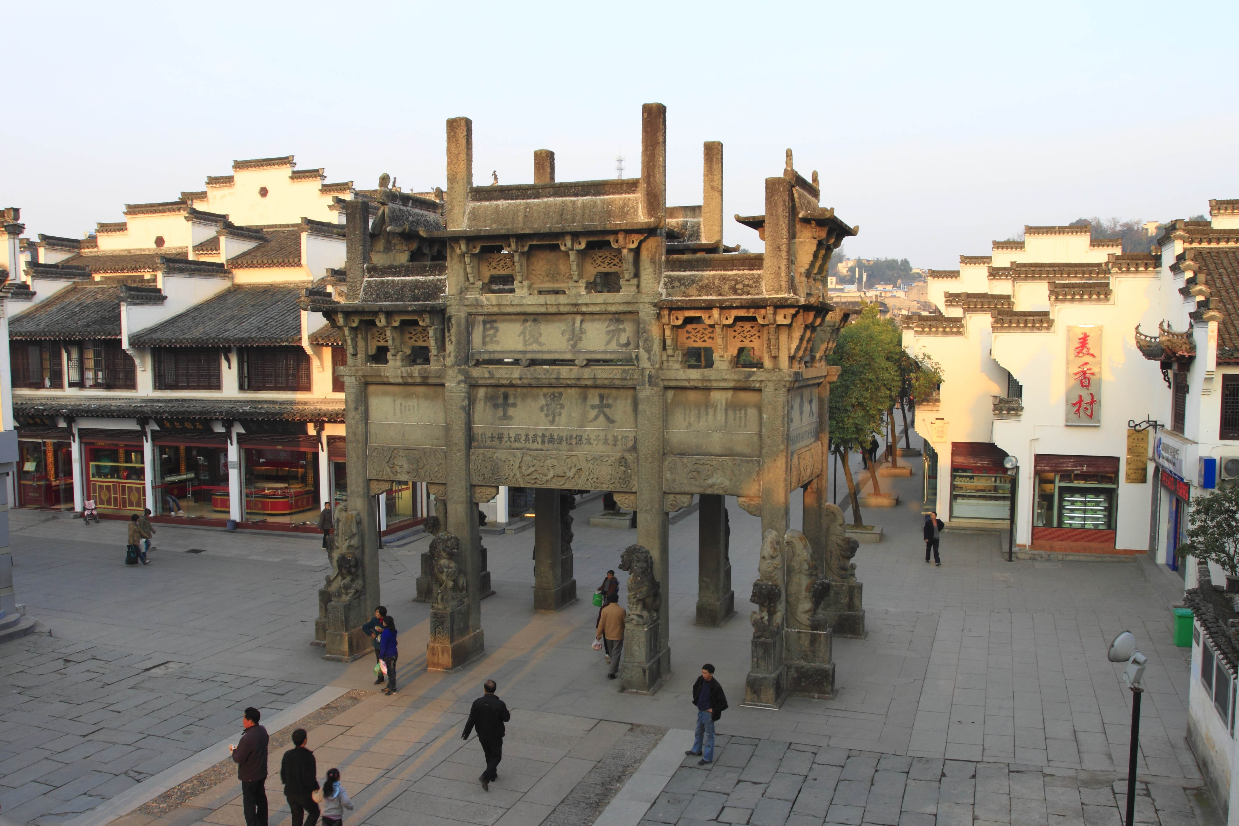 许国石坊，全国重点文物保护单位，位于安徽省歙县。